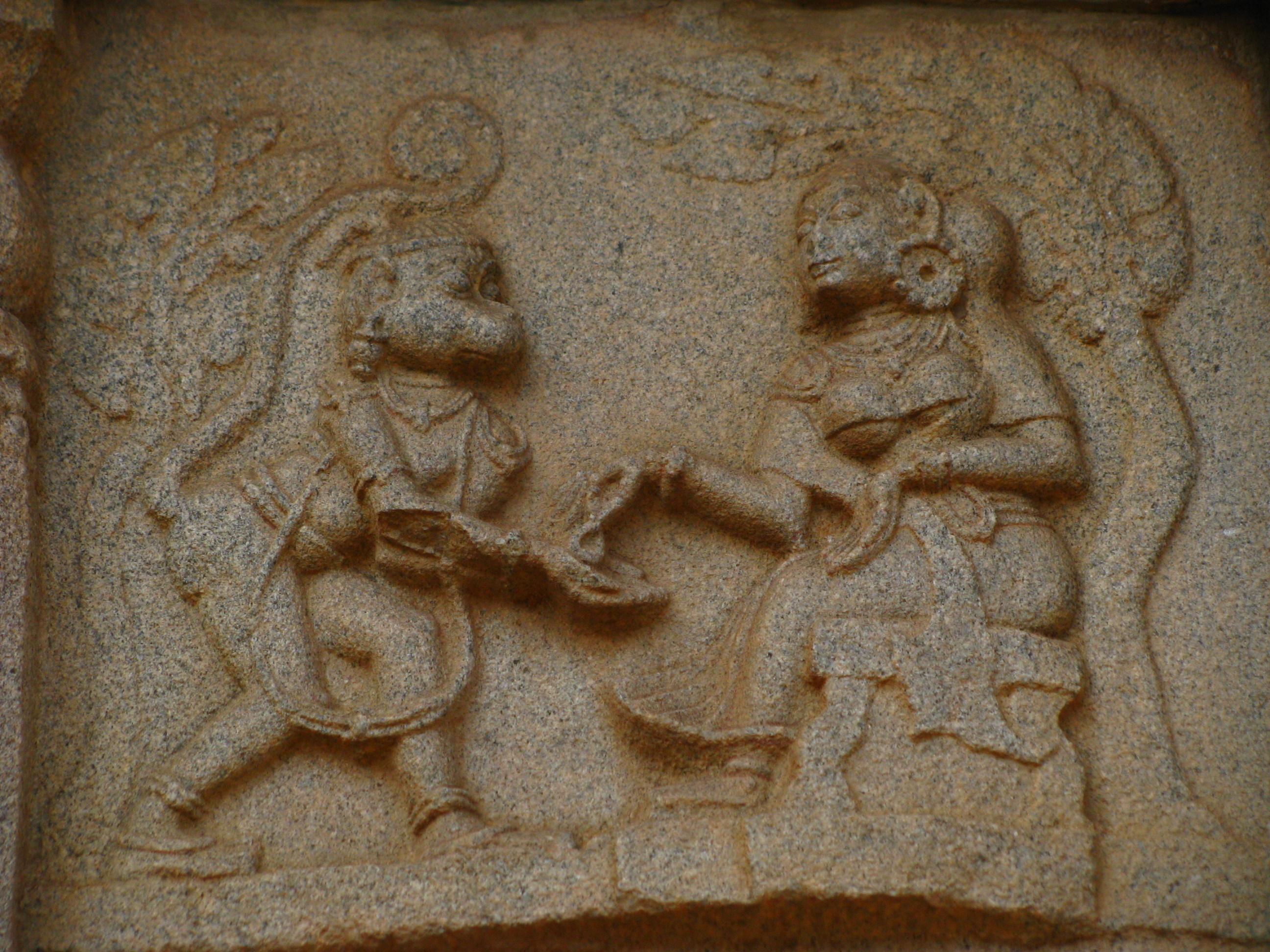 Hanuman taking Sita's ring